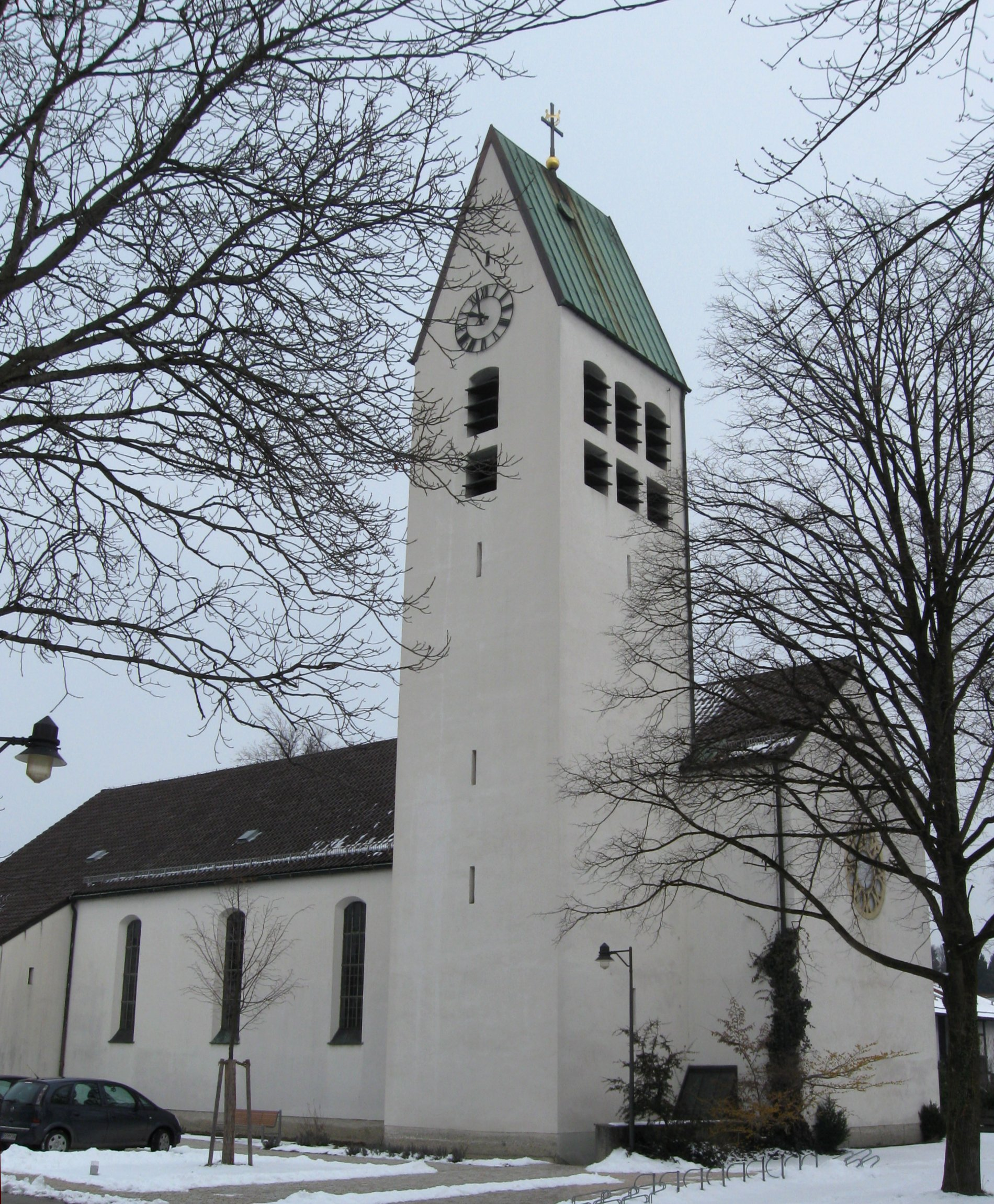 Kath. Pfarrkirche Hl. Kreuz, Raubling